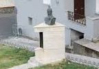 Piazza